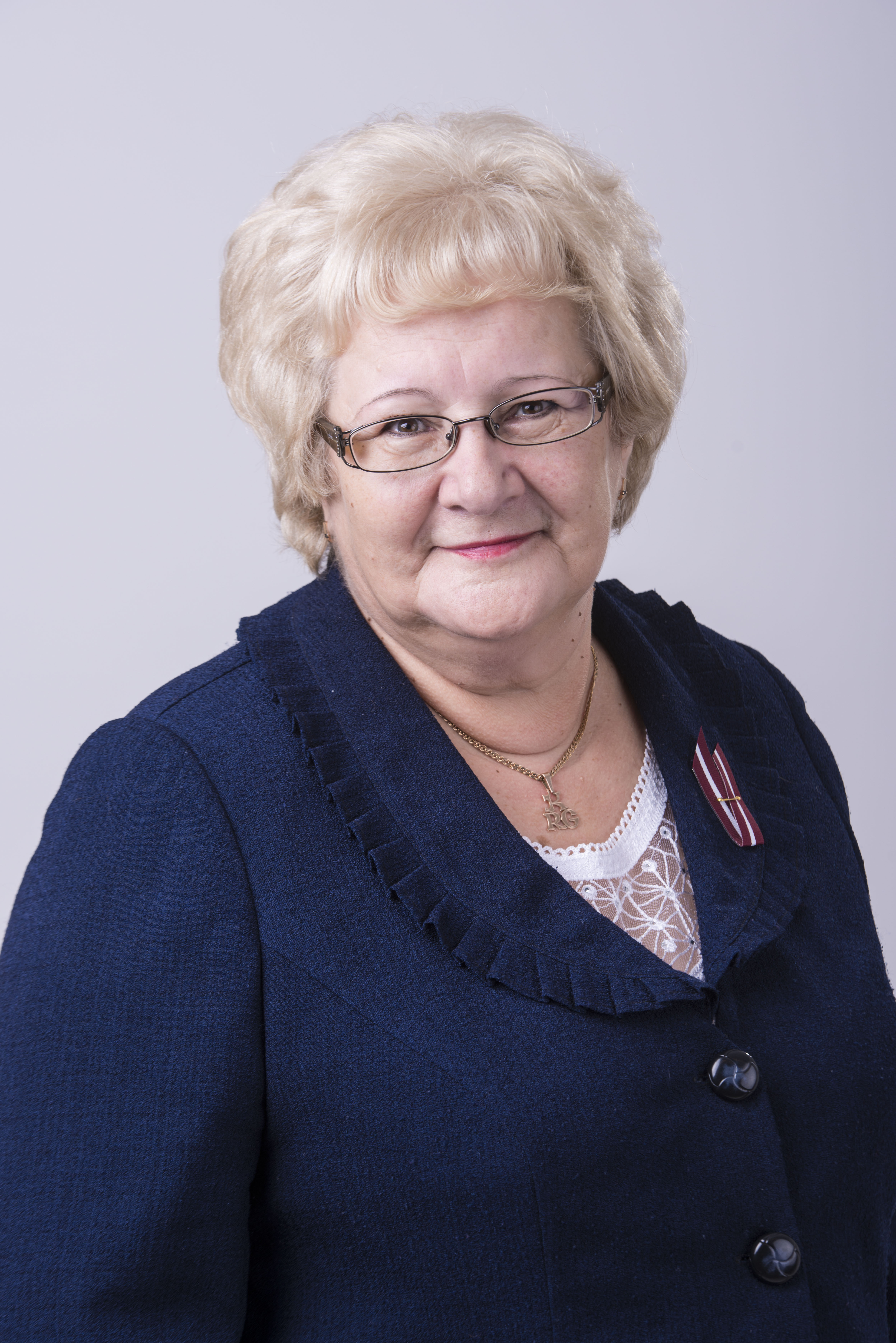 2014.gada 9.decembris. 12.Saeimas deputāte Āija Barča. Foto: Reinis Inkēns, Saeimas Kanceleja Izmantošanas noteikumi: saeima.lv/lv/autortiesibas